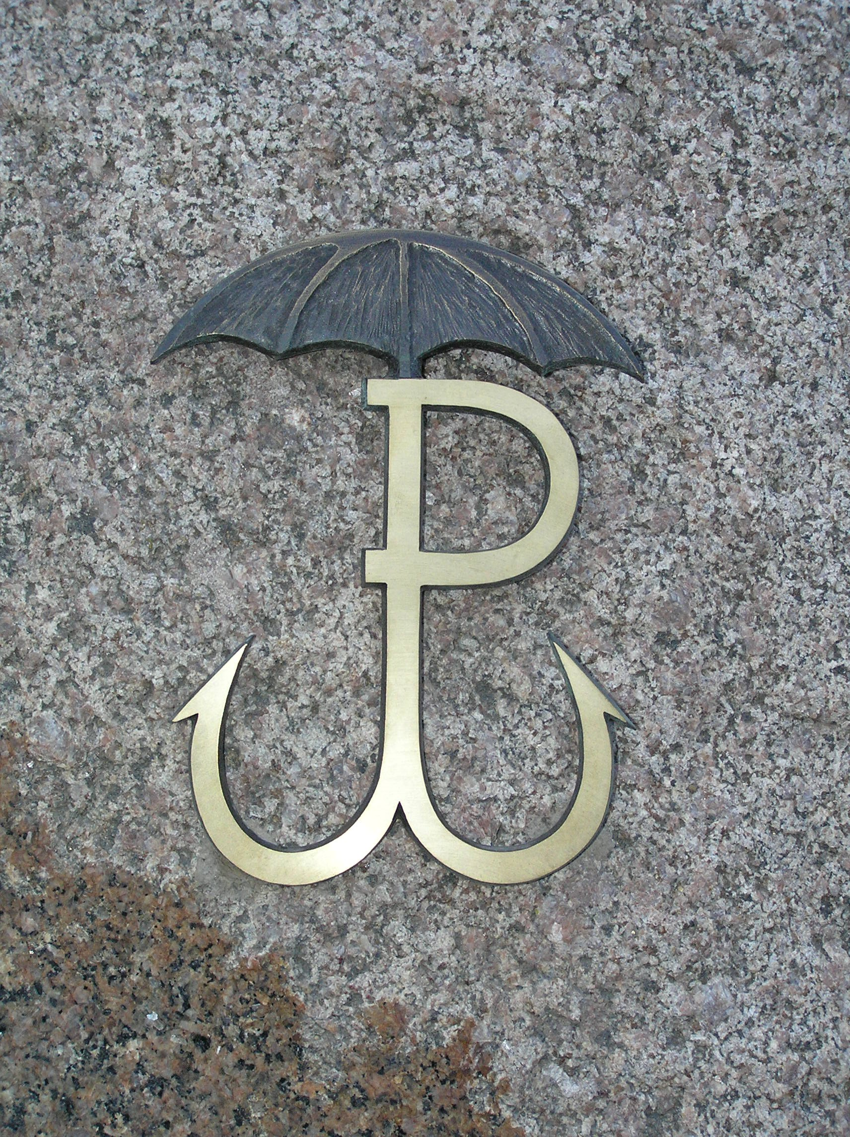 Pomnik przy Wolskiej, Pałacyk Michla, emblemat Batalionu Parasol